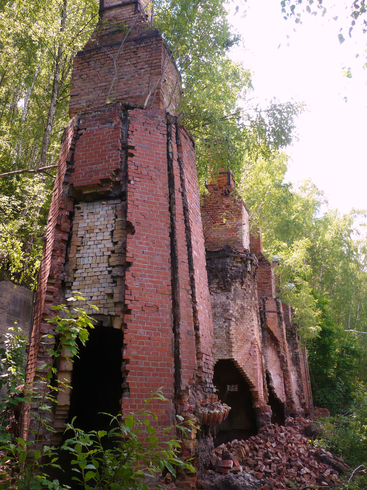 Nowa Ruda, piece do prażenia łupku